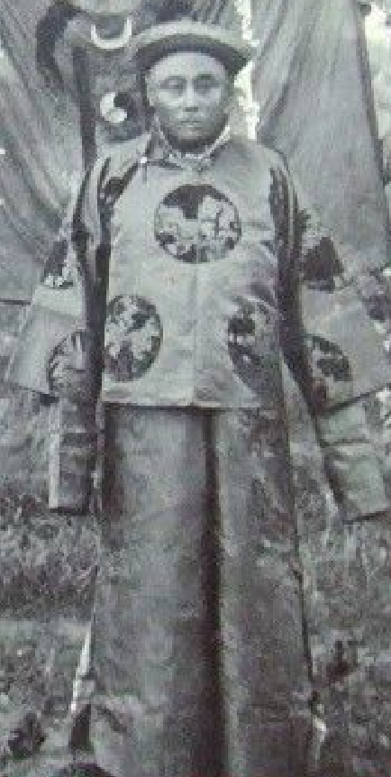 バボージャブМонгол: Шударгабаатар Бавуужав